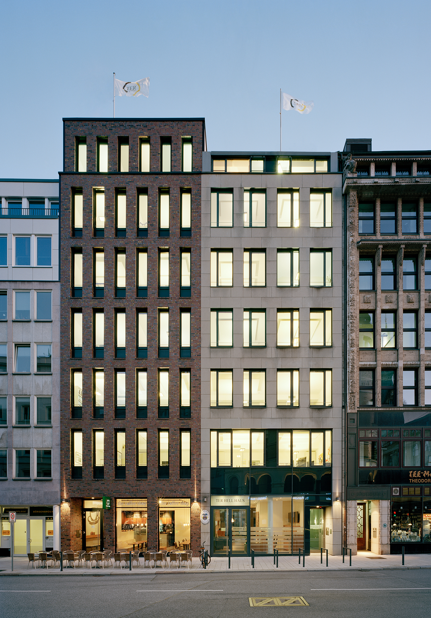 Auf dem Foto ist das Bürogebäude des Unternehmens TER Chemicals Distribution Group mit Standort in Hamburg zu sehen.